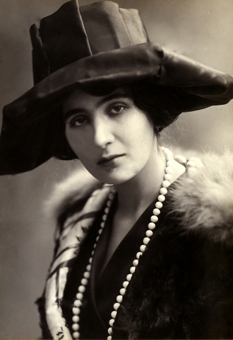 Borgosiepi, Raccolte Museali Fratelli Alinari, Alda Borelli anno 1922.